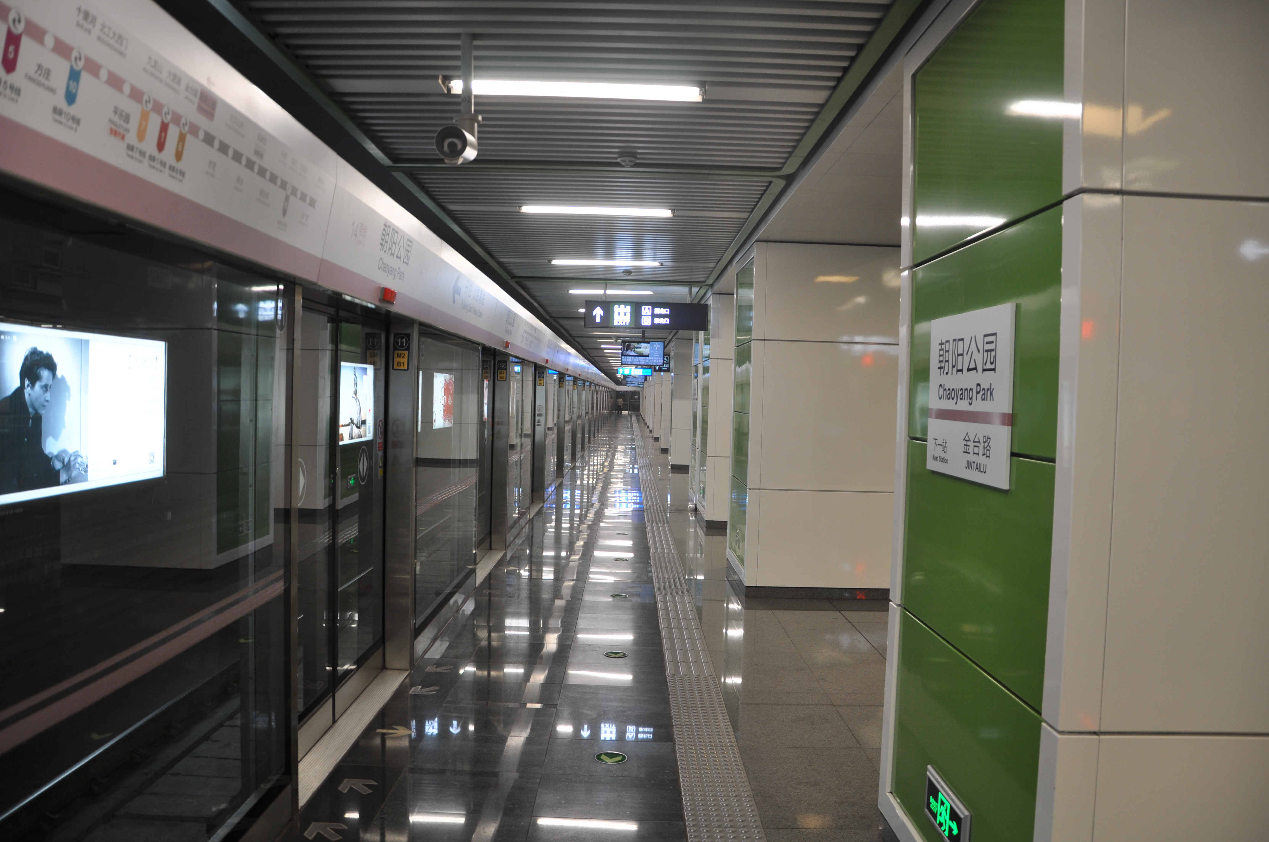 北京地铁14号线朝阳公园站站台